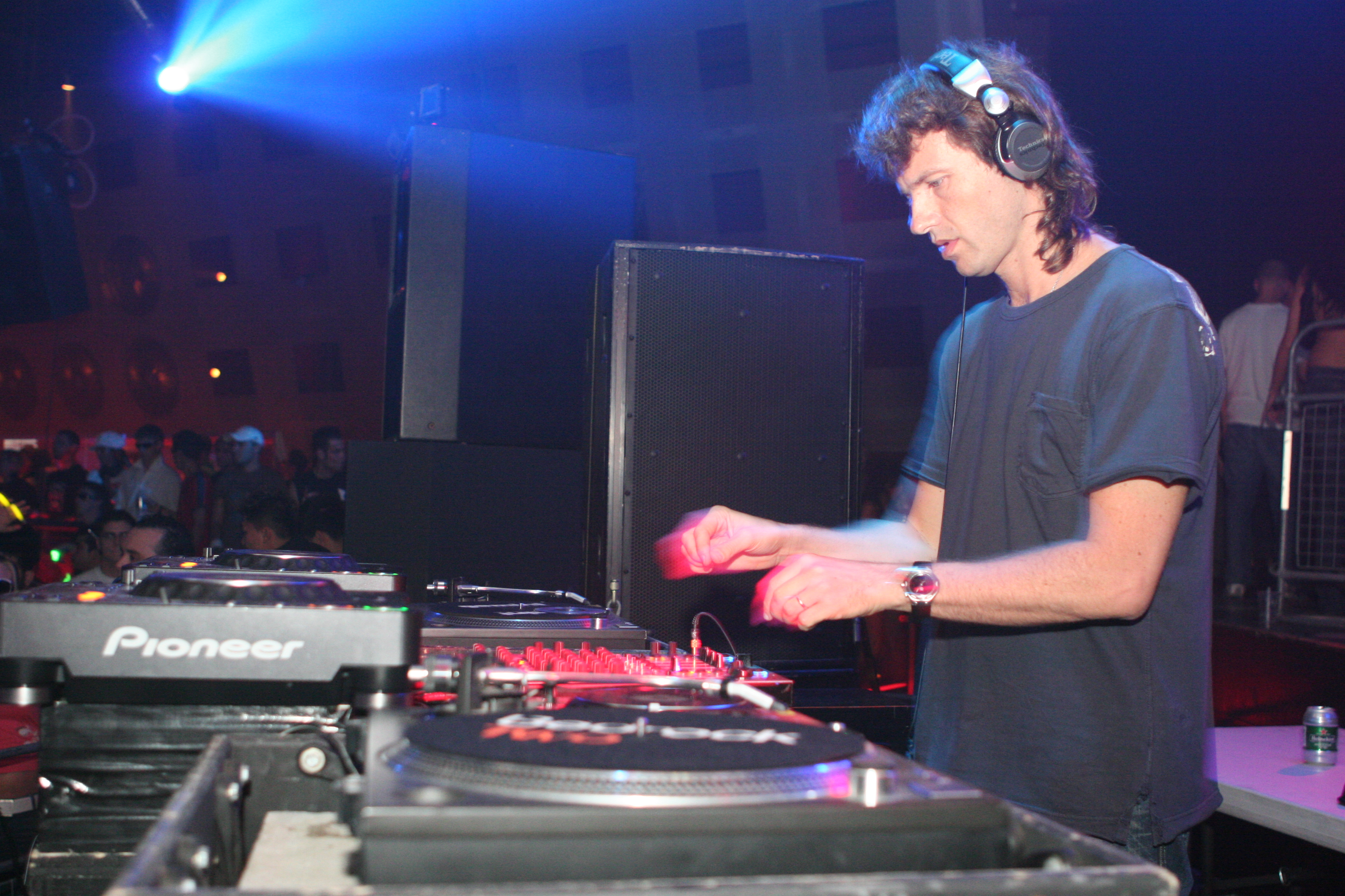 Argentine deejay Hernán Cattáneo in Toronto.IMG_5653